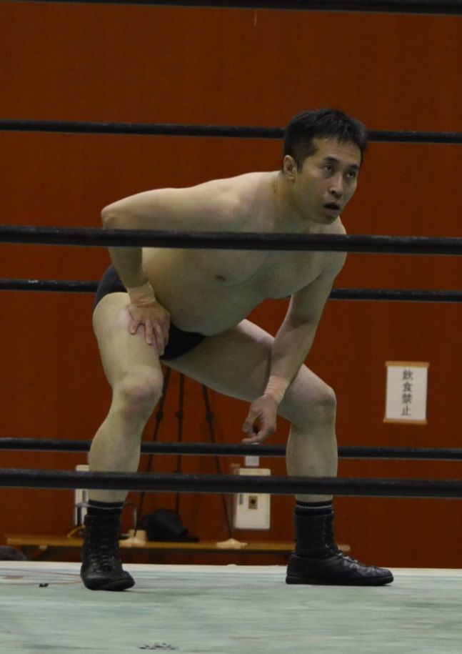 大柳錦也。